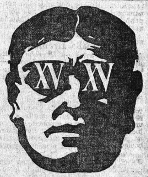 Encart publicitaire annonçant Le Mystère des XV, le prochain roman-feuilleton de Jean de La Hire. Extrait de l'édition du quotidien Le Matin du 21 avril 1911.